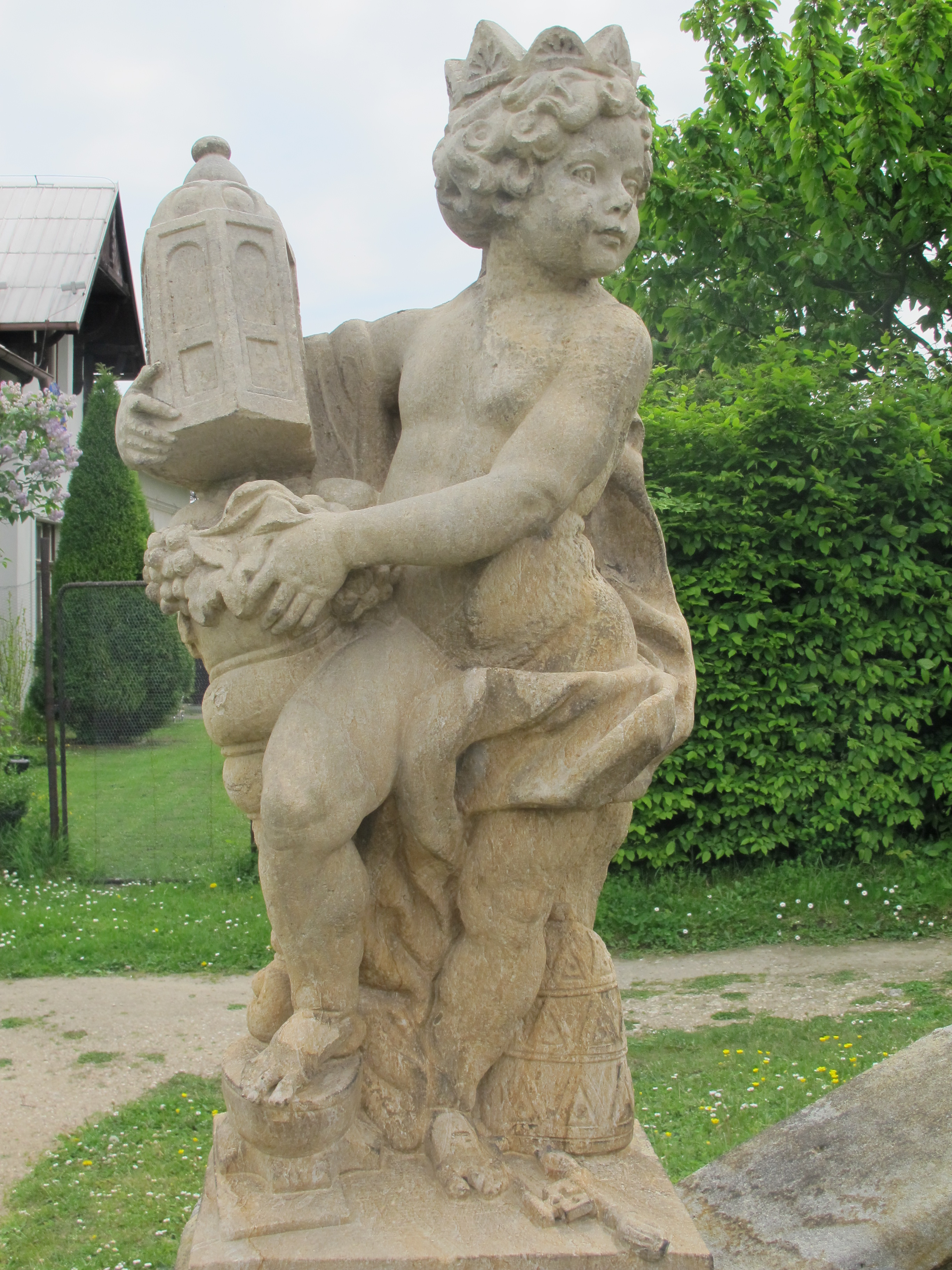 Alegorická socha Evropa. Zámek Lysá nad Labem, Zámecká 1/21, Lysá nad Labem